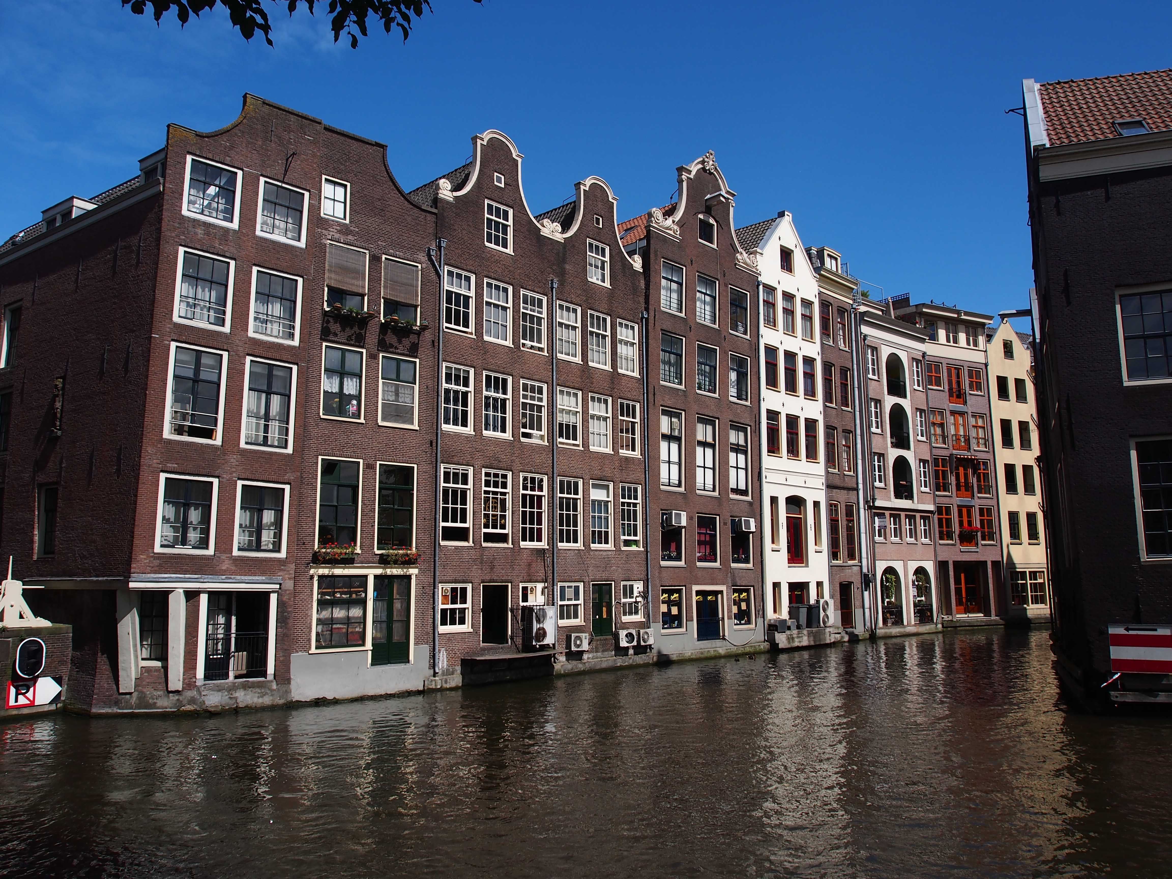 View of the sluice gate of Oudezijds Kolk (left), Oudezijds Achterburgwal (middle), and Oudezijds Voorburgwal (right). The houses on the water have the Zeedijk as their street address. Photographed in Amsterdam, The Netherlands.